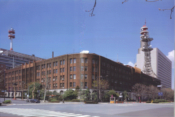 内務省庁舎（中央合同庁舎第二号館）